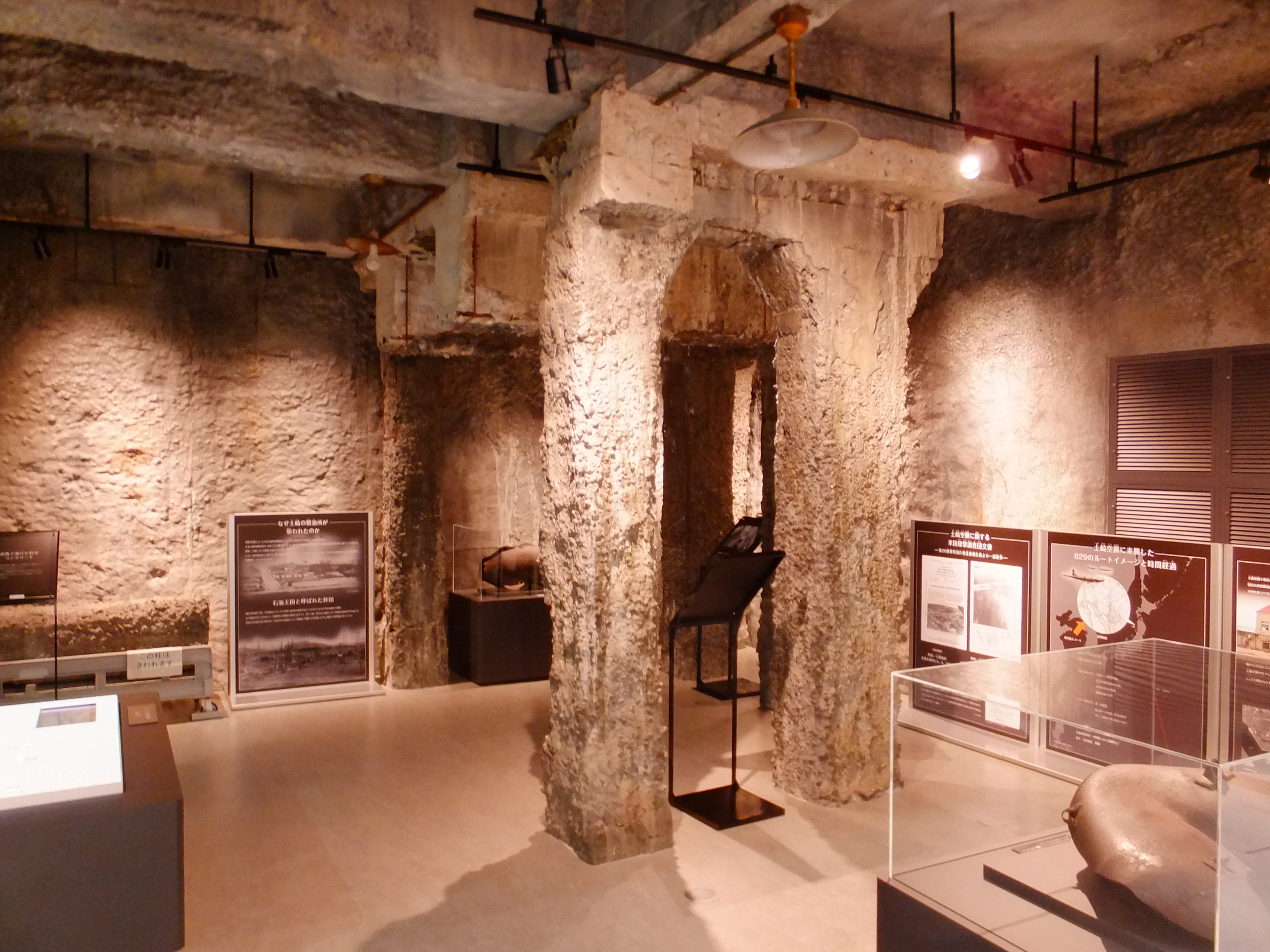 土崎みなと歴史伝承館内にて。1945年8月14日未明の土崎空襲で罹災した「被爆倉庫」の柱の一部が展示スペース内に移築されている。